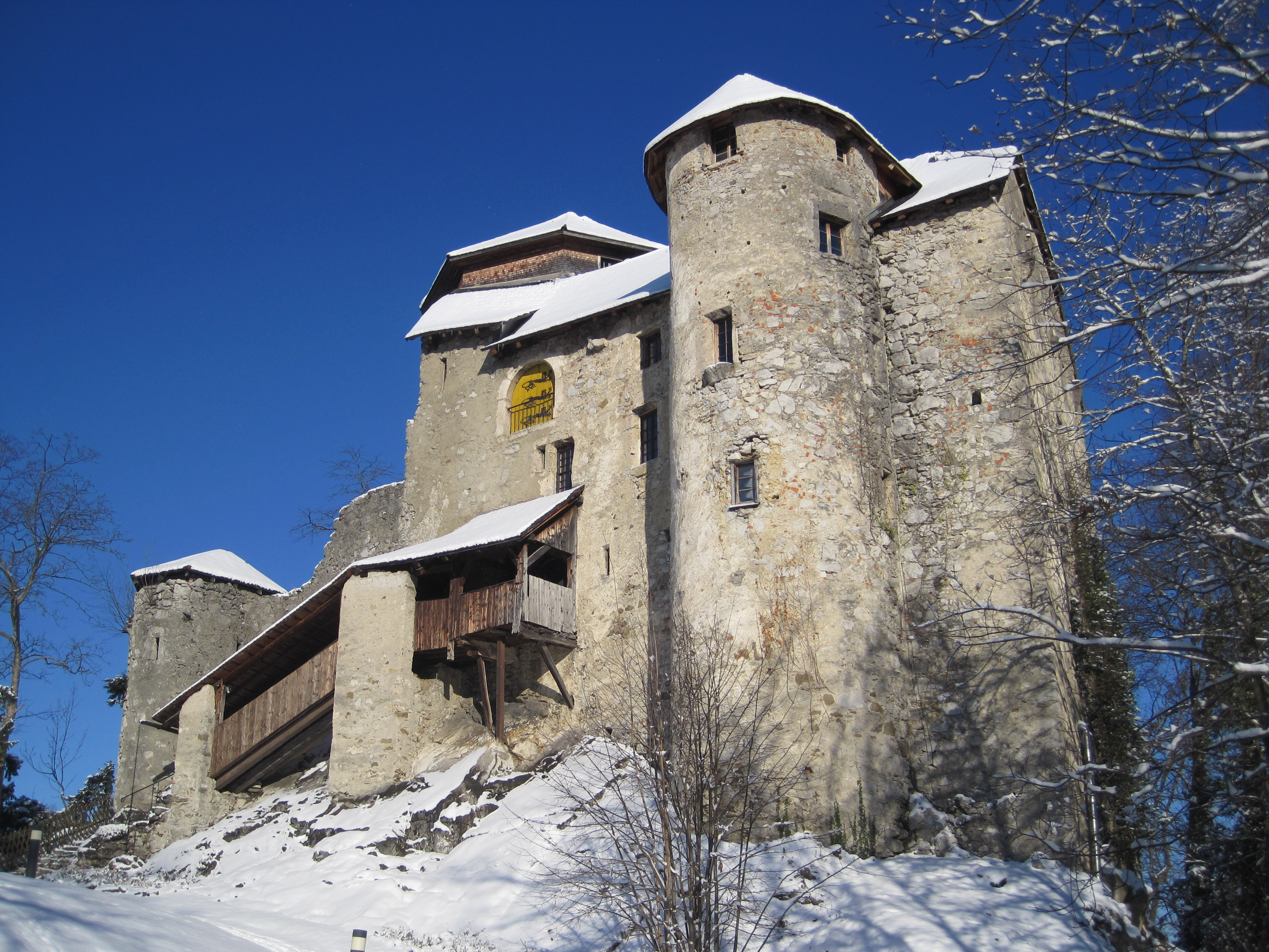 Schloss Glopper oder Burg Neuems 1343, Winter 2009